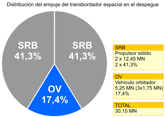 Distribución del empuje de los motores del Transbordador Espacial en el momento del despegue